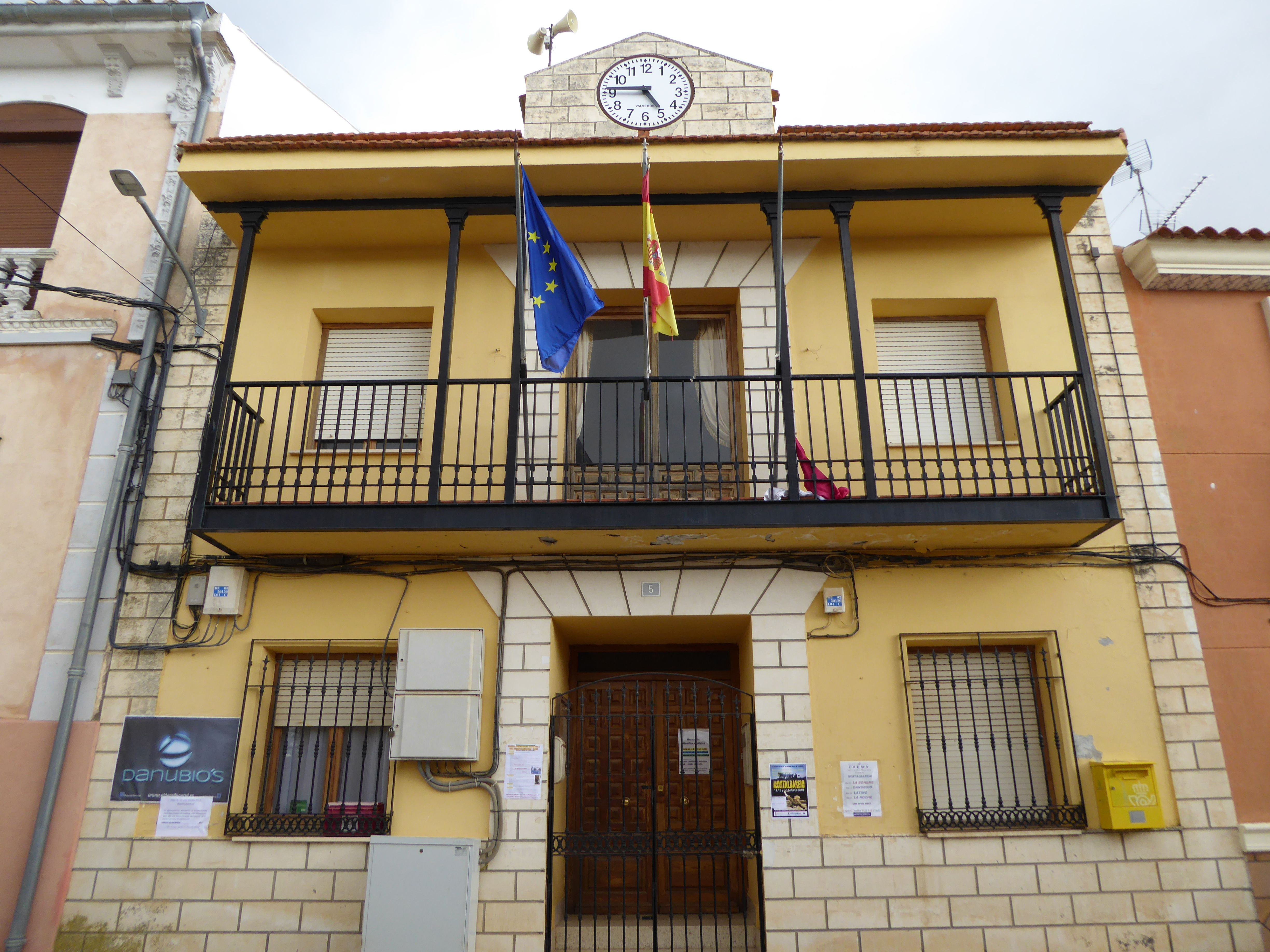 Montalbanejo